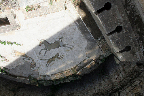 Mosaici Piazza Armerina